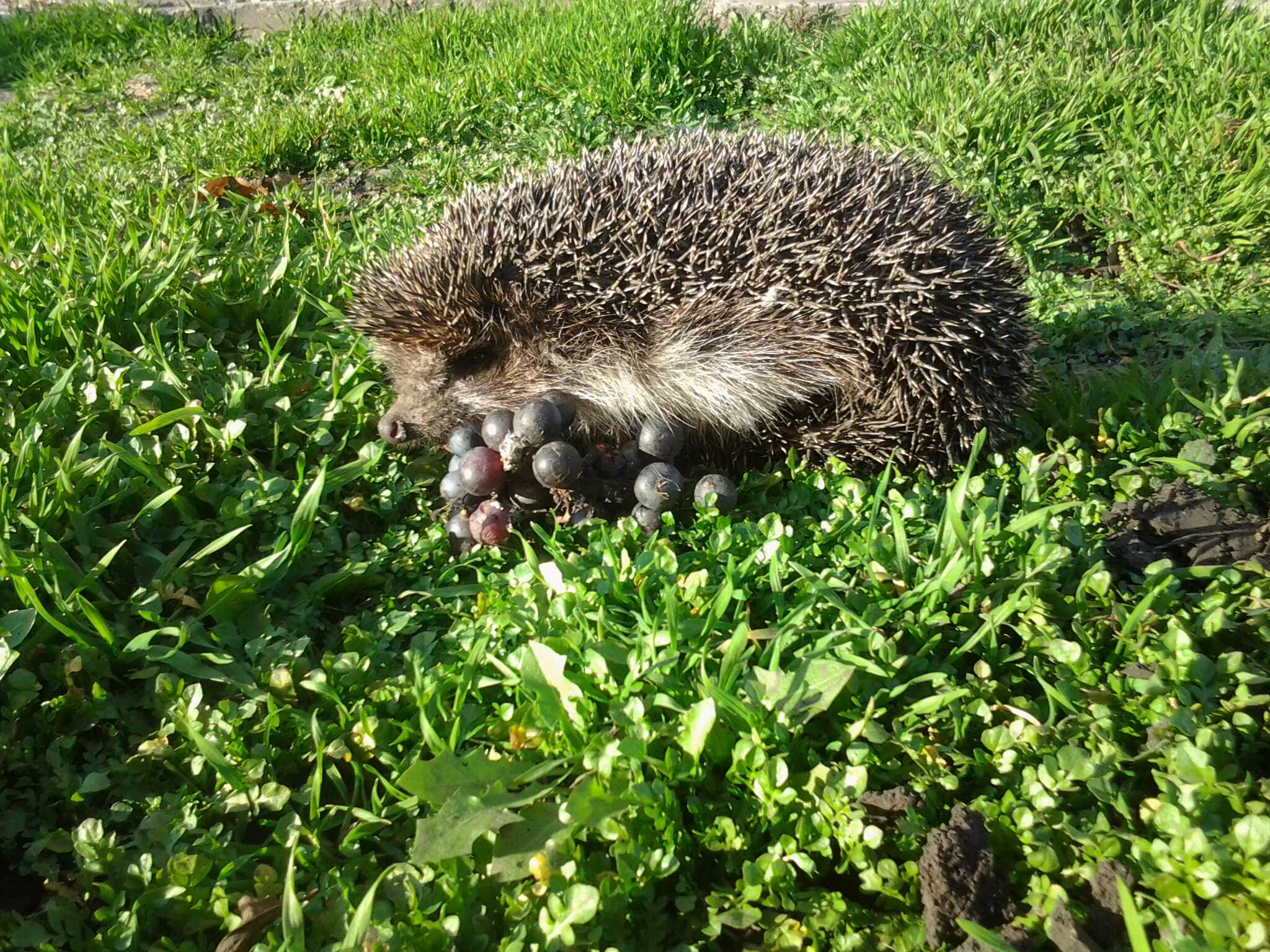 Ёжик